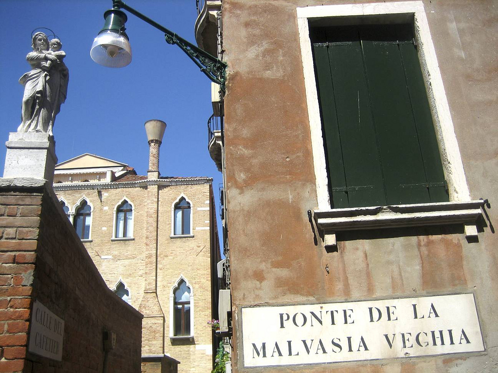 Ponte de la Malvasia Vechia, Venezia, Italy.